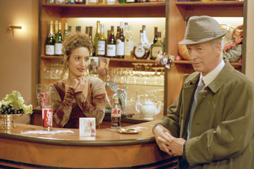 Sabine Koning & Wik Jongsma